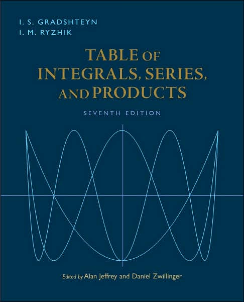 Einband des Gradshteyn-Ryzhik 7. Aufl.